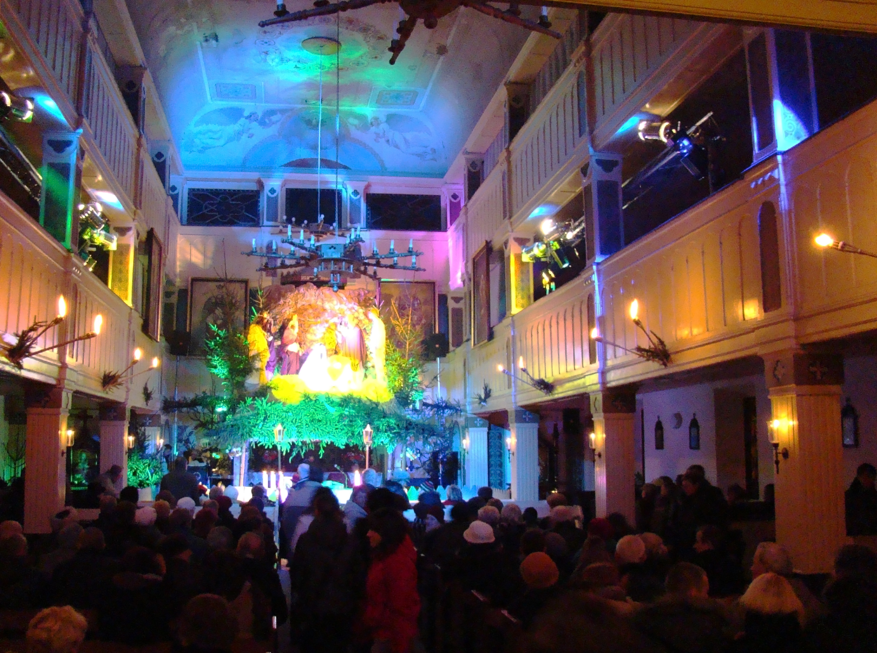 Pasterka 2009 - Kościół pw. św. Stanisława Kostki / Kościół Ewangelicko - Augsburski w Aleksandrowie Łódzkim (powiat zgierski, województwo łódzkie), Polska